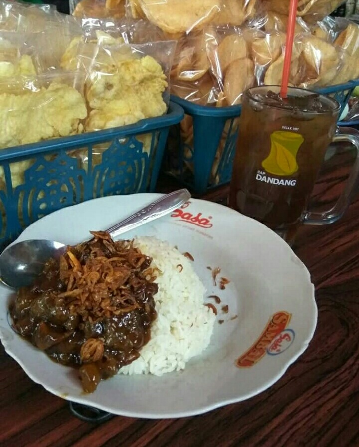 Nasi Jagal merupakan makanan khas dari Kota Tangerang, Banten